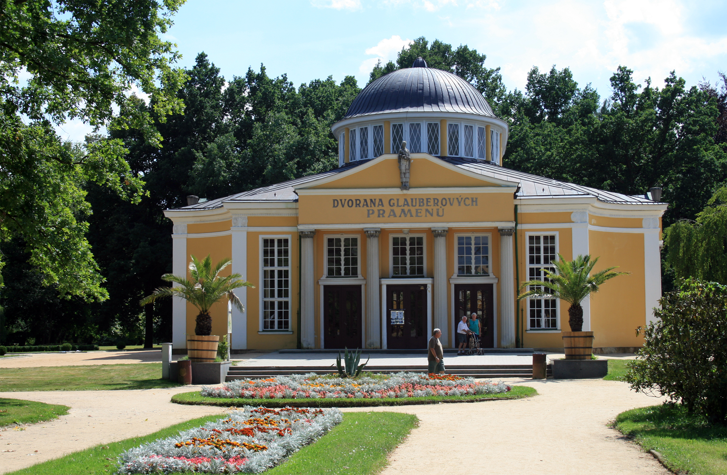 Františkovy Lázně